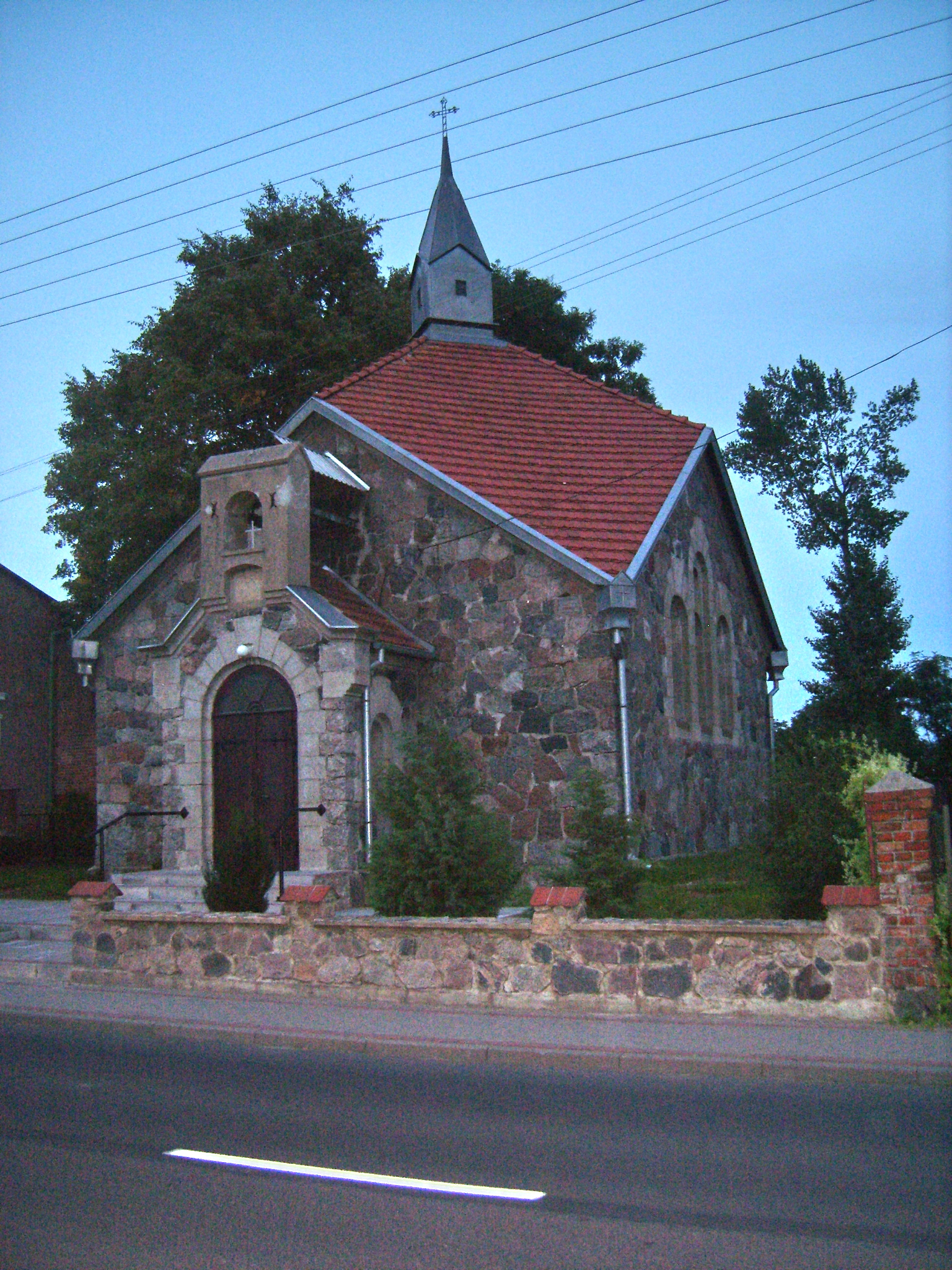 Kirche in Debrzno Wieś.